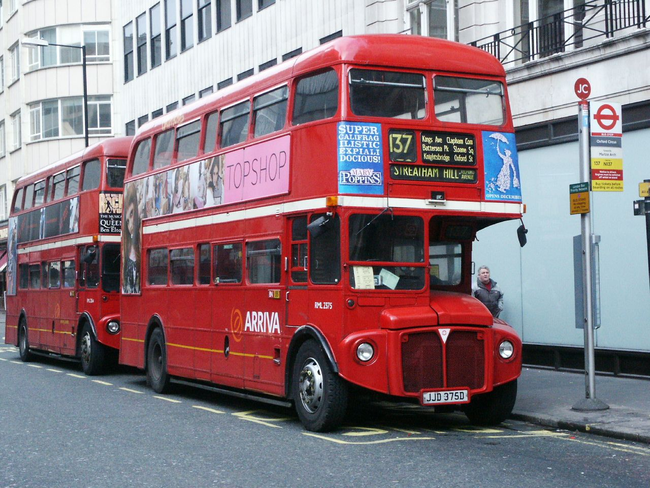 2375-JJD375C 060304 cps